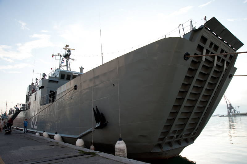 Dan HRM-a, Rijeka